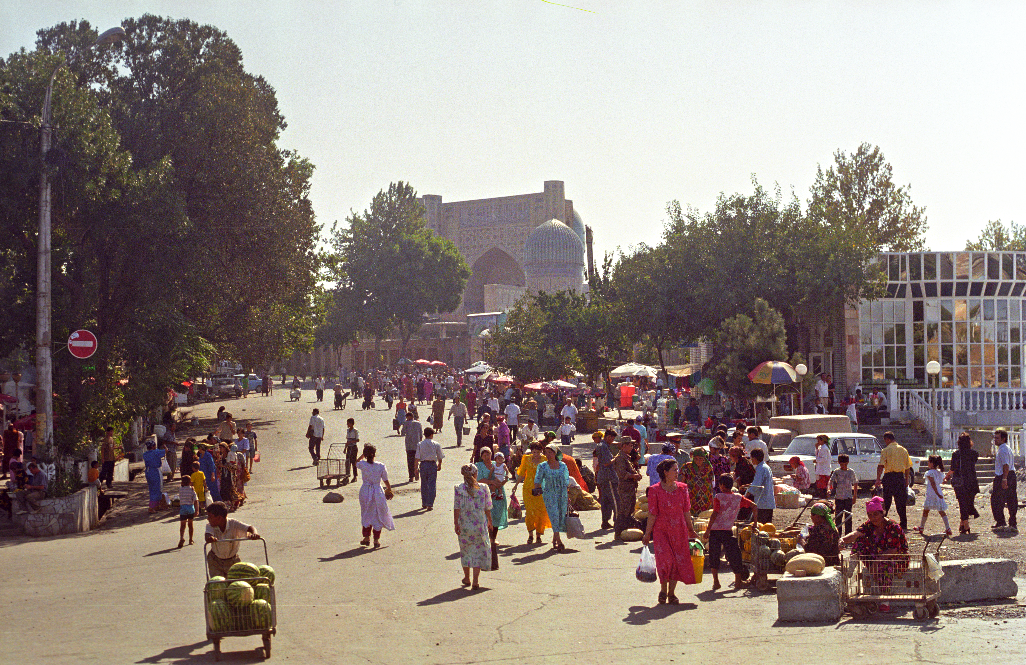 Usbekistan: Bibixonim-Moschee in Samarqand